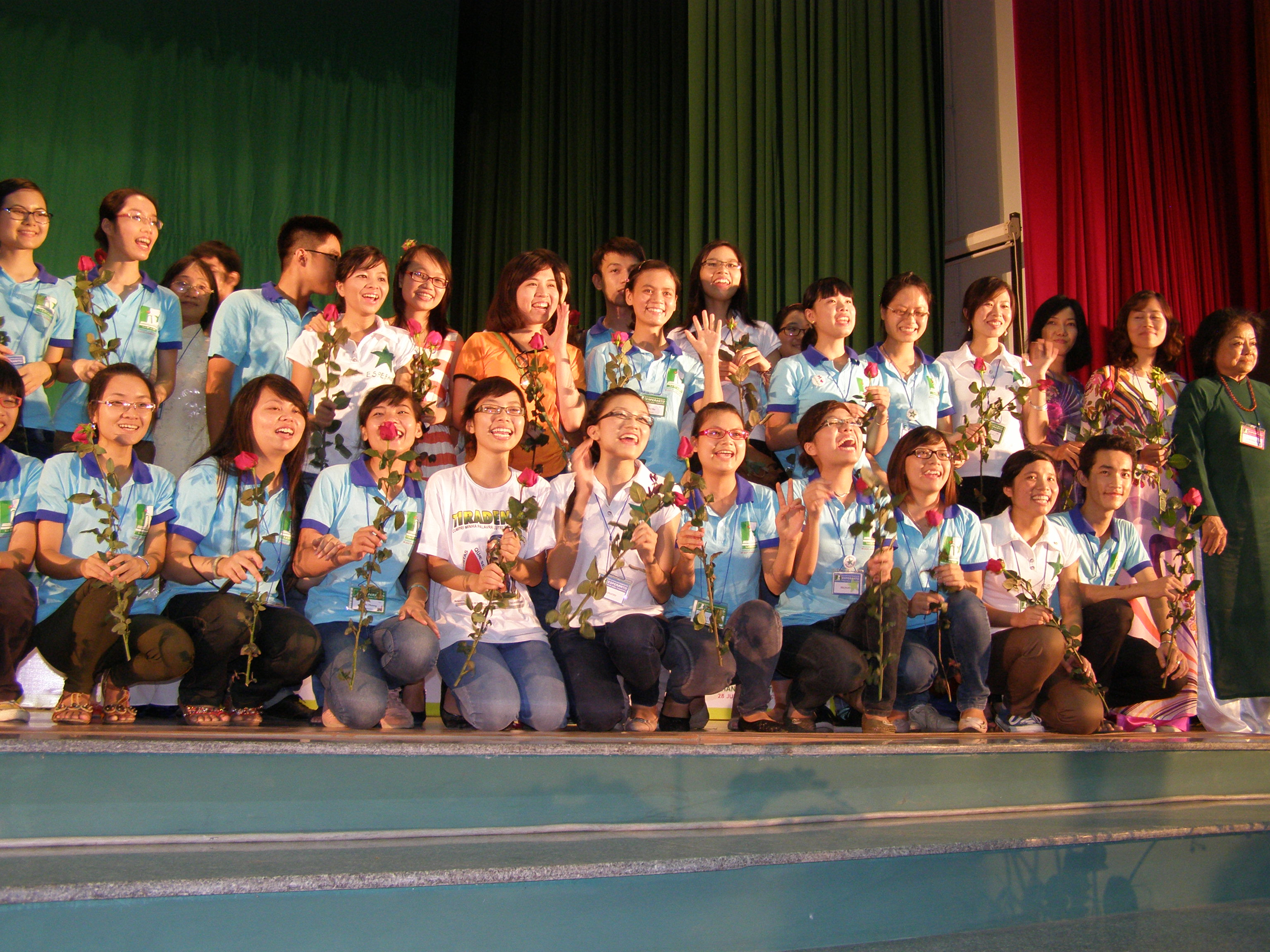 Vjetnamaj esperantistoj reciprokas la partoprenantojn de la fina ceremonio de la 97-a Universala Kongreso, responde al "Dankon!" kriante: "Ne dankinde!". Hanojo, Vjetnamio.